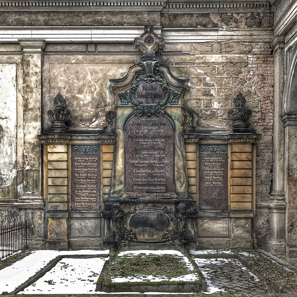 Grabstätte der Familie des Lederfabrikanten Robert Bierling auf dem Neuen Annenfriedhof in Dresden-Löbtau: Friedrich Robert Bierling (* 28. April 1815; † 17. Dezember 1861) und Hermann Robert Bierling (* 15. August 1839; † 13. April 1896) sowie Friedrich Robert Max Bierling und Hermann Georg Bierling (nicht zu verwechseln mit der Glockengießer-Familie C. Albert Bierling).